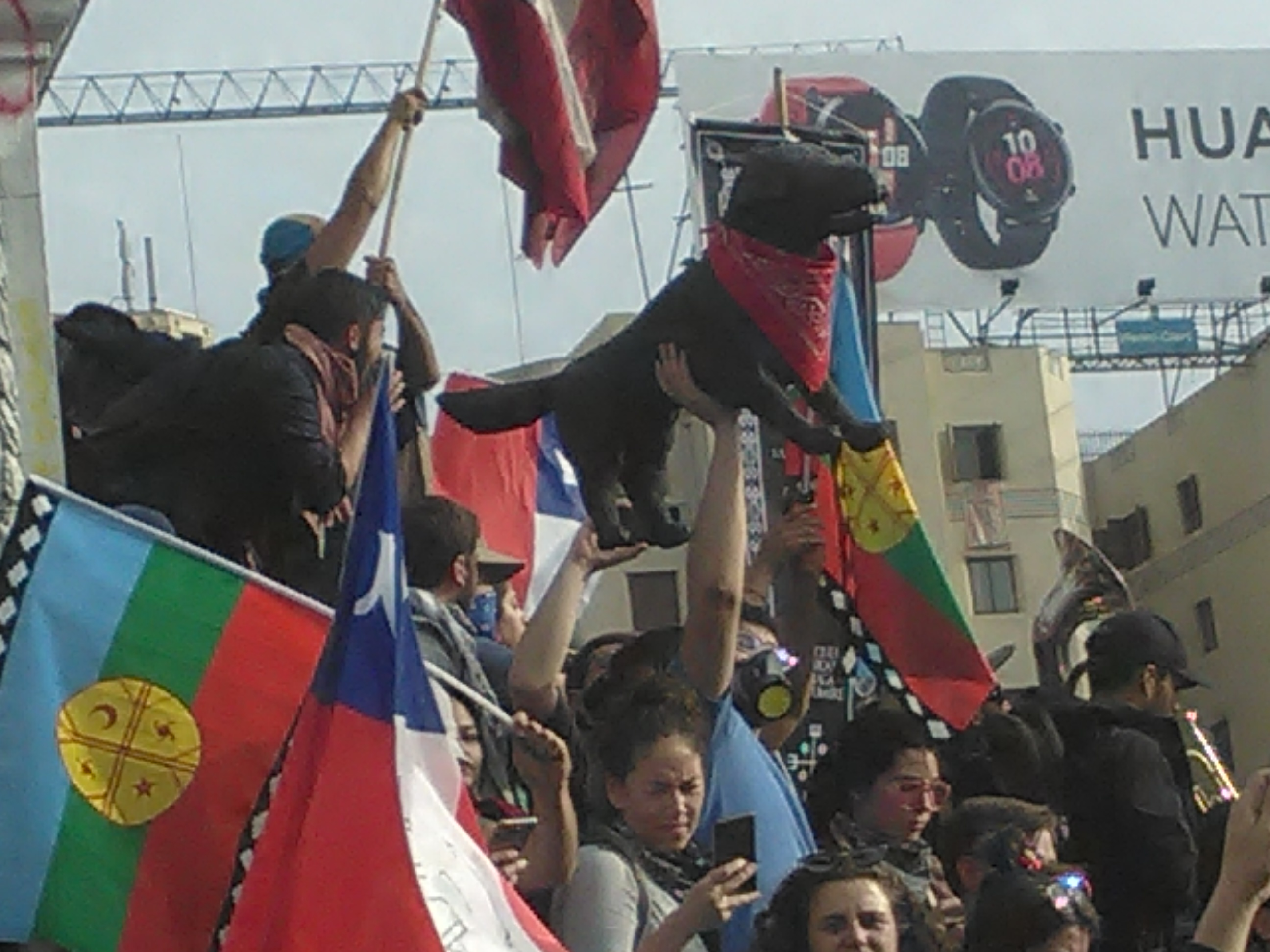 Representación del Perro Matapaco en papel maché en una manifestación en Plaza Italia durante la segunda gran manifestación en dicho lugar. Perro es uno de los símbolos de esas manifestaciones